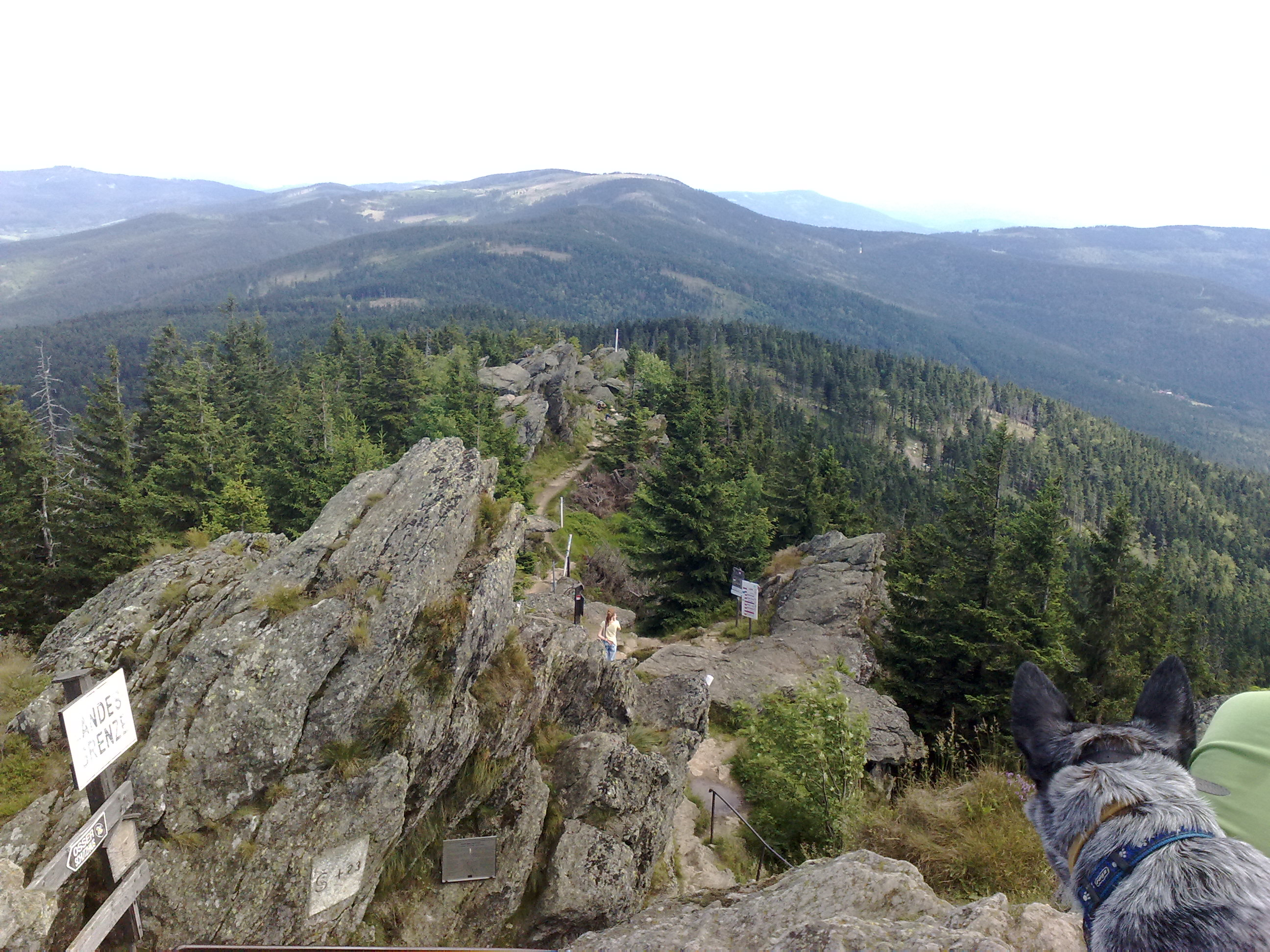 Fotky z mého výletu na Ostrý